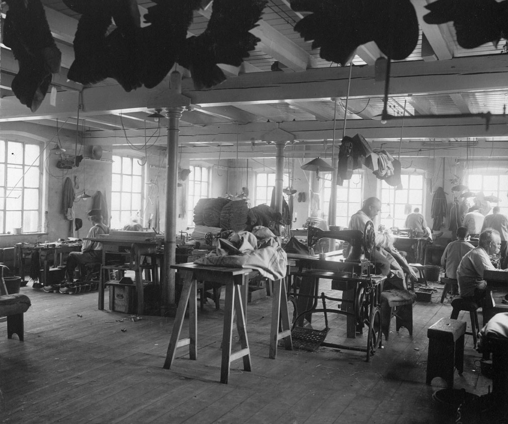 Kristiania tvangsarbeidsanstalt. Skomaker- og skredderverksted. Datert august 1914. Fotograf: Ludvig Forbech. Fra arkivet etter Fengselsstyret, S-1043/1/U/L0005/010